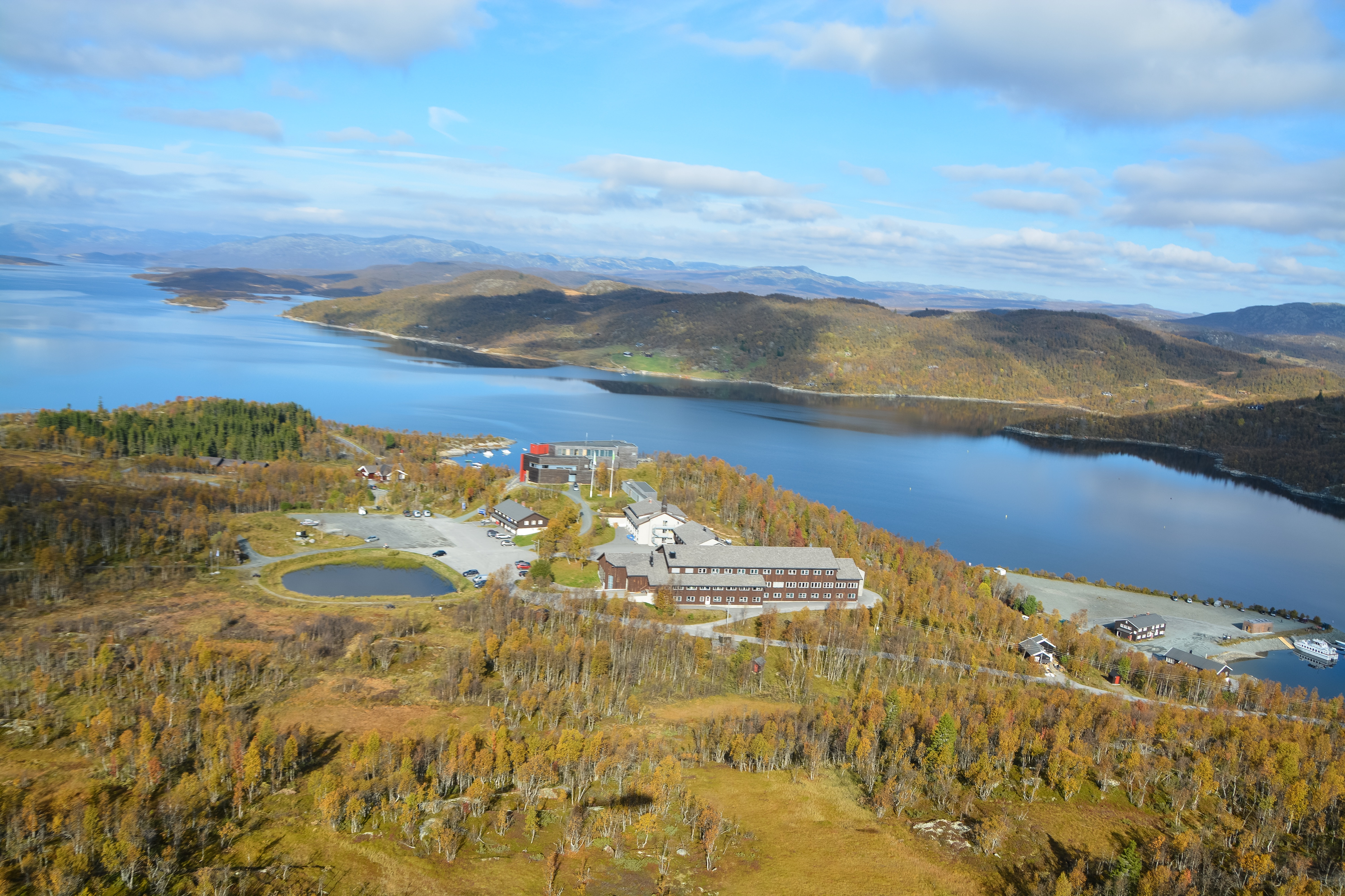 Oversikt over Skinnarbu, med Skinnarbu Nasjonalparkhotell, Hardangervidda Nasjonalparksenter, Møsvatn og Hardangervidda i bakgrunnen.